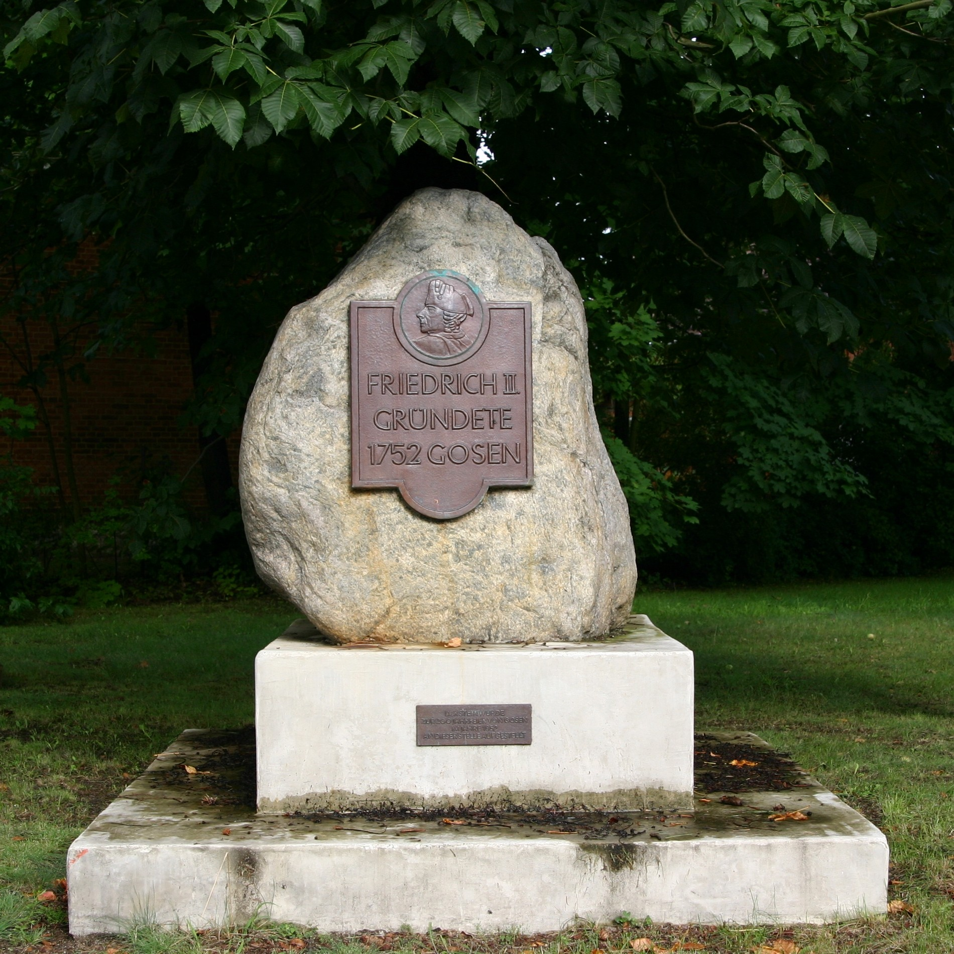 Denkmal zur Gründung von Gosen, Deutschland.